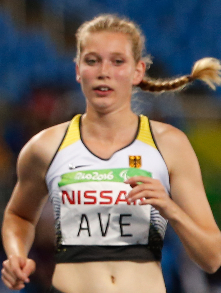 Lindy Ave im 100-m-Lauf bei den Paralympics 2016 in Rio de Janeiro.